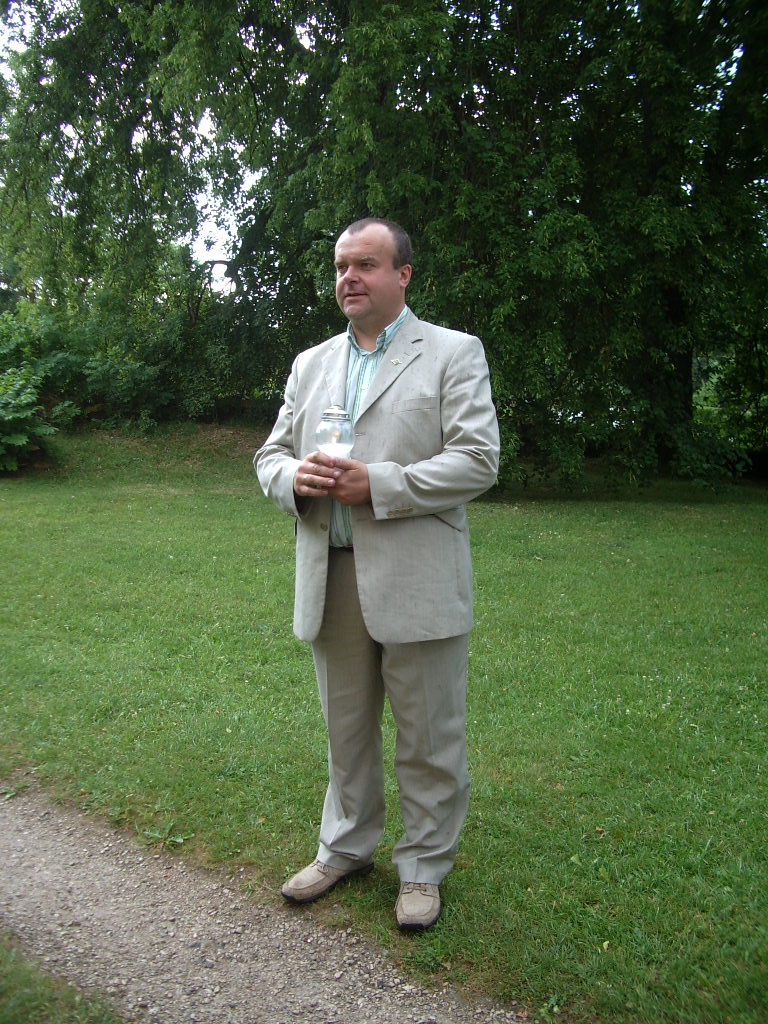 Kaido Kaasik